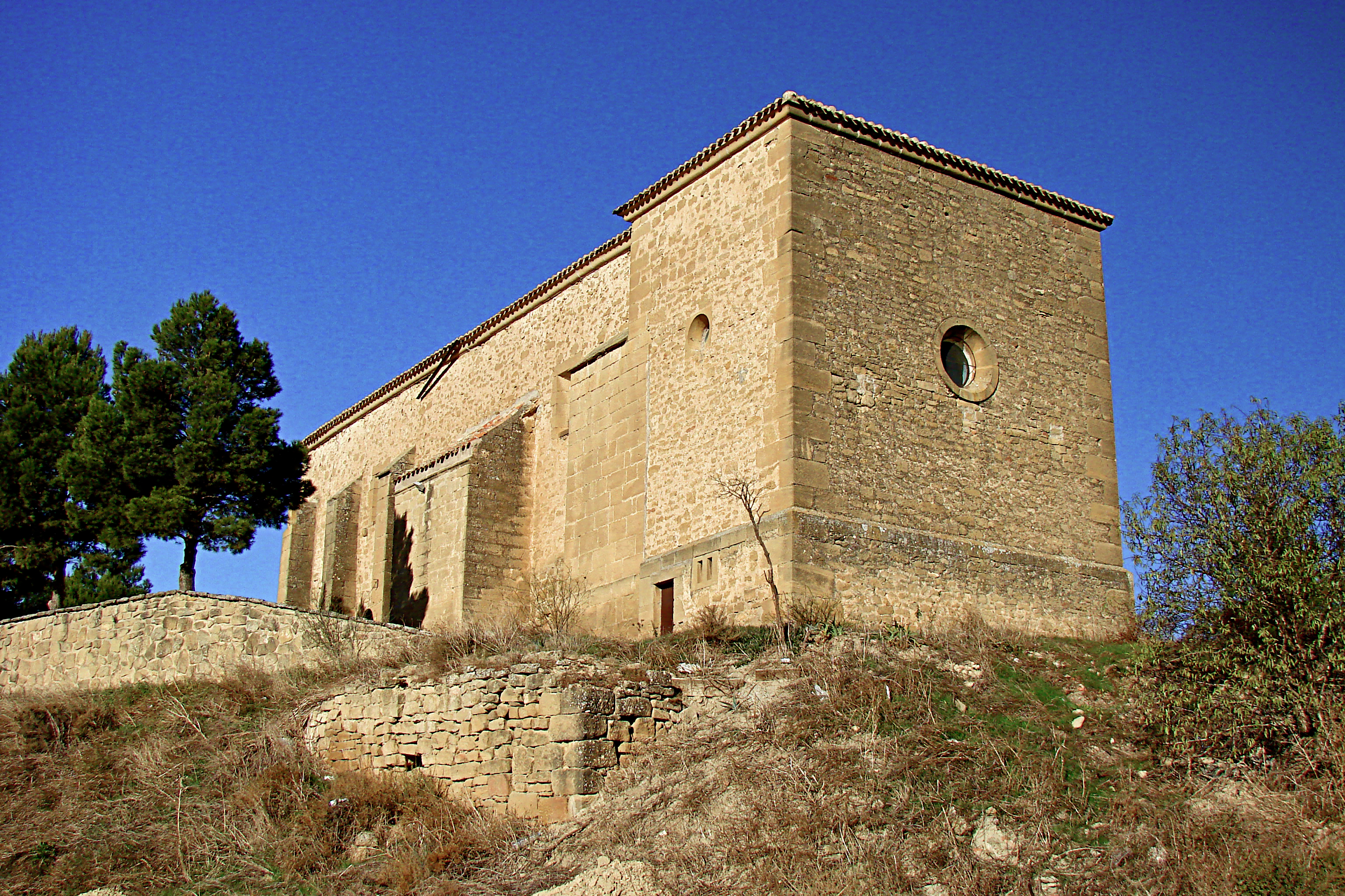 Ermita de Davalillo-San Asensio